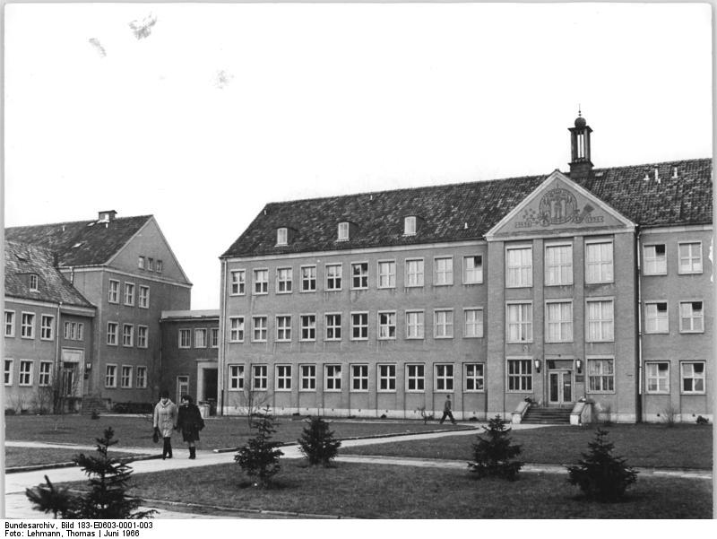 Greifswald, Universitätsgebäude Zentralbild Lehmann 3.6.1966 Moderne Institutsbauten entstanden in den letzten Jahren in der 500 Jahre alten Ernst-Moritz-Arndt-Universität Greifswald, die im März dieses Jahres den 20.Jahrestag der Wiedereröffnung nach dem 2. Weltkrieg begehen konnte. In diesem Neubaukomplex sind u.a. das Pharmazeutische, das Geologische, das Mineralogische, das Mikrobiologische, das Agrobiologische und das Geografische Institut untergebracht.